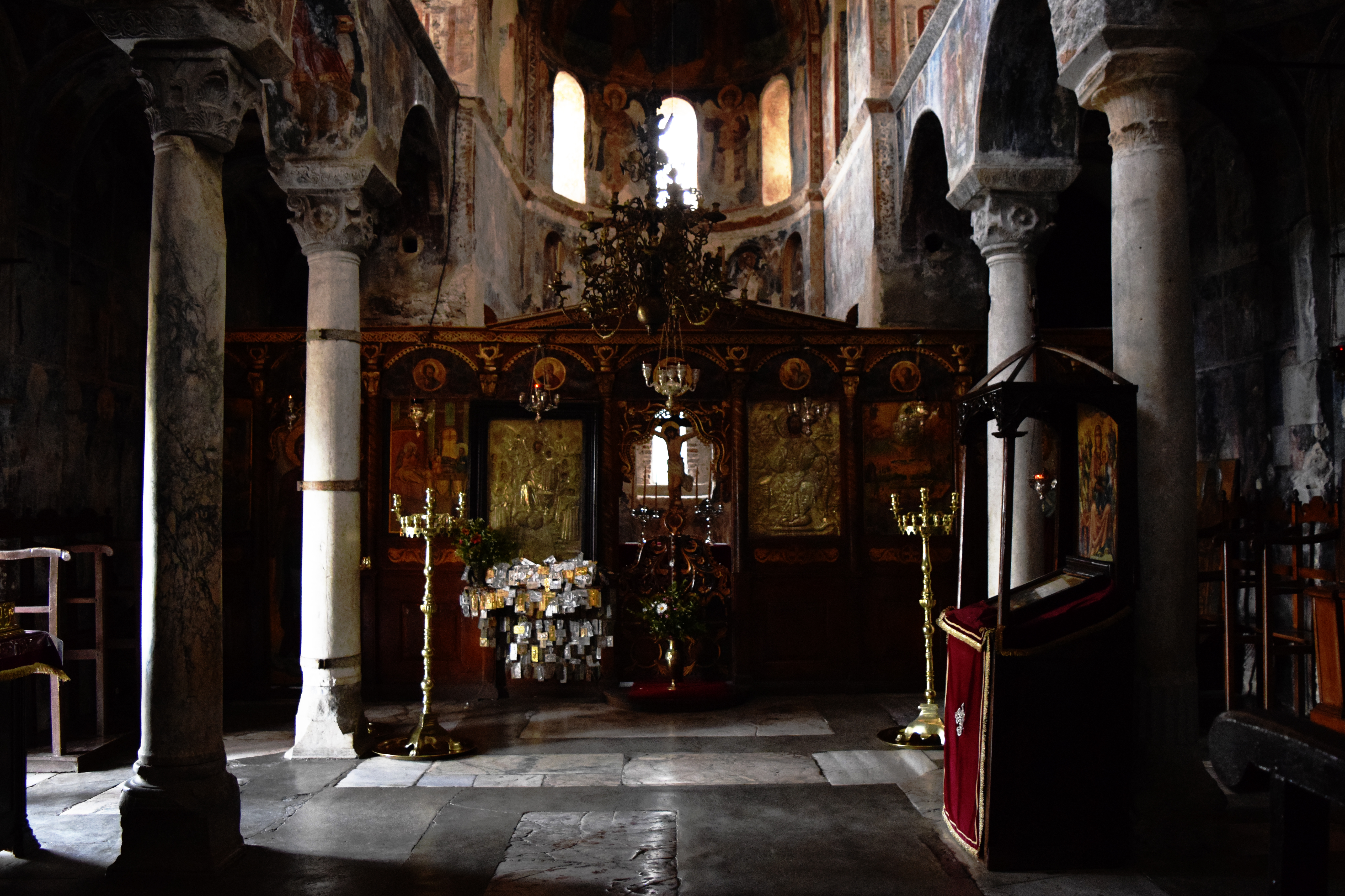 Παντάνασσα Μυστρά«Μονή Παντάνασσας»